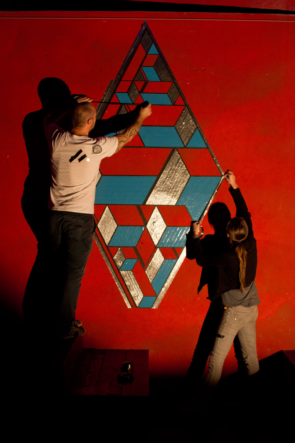 TAPE OVER - perspective tape art @ Cabaret Aléatoire (Marseille /France)